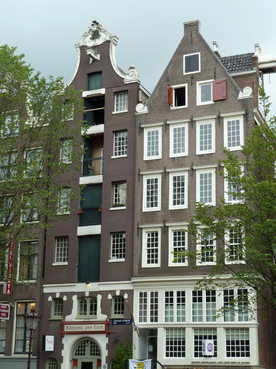 Amsterdam Ons'Lieve Heerop Solder